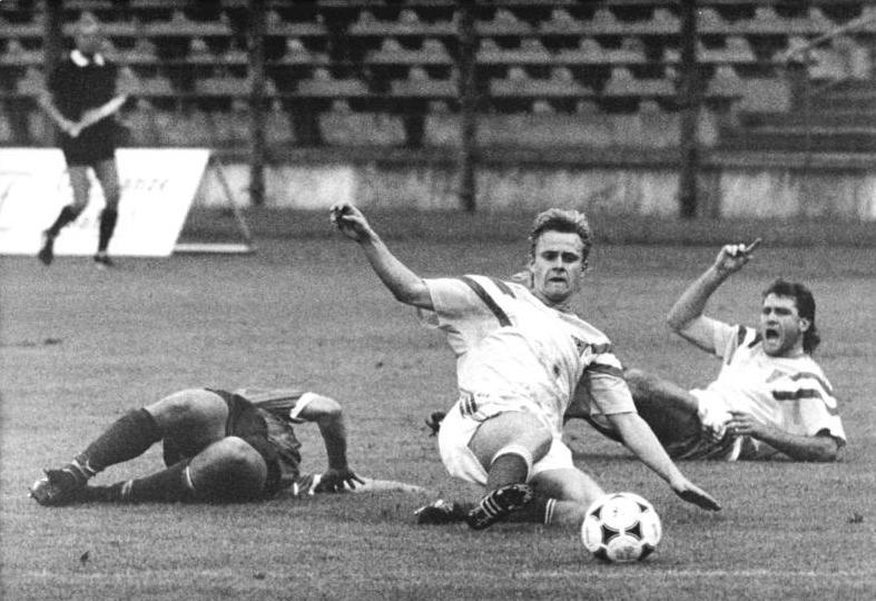 ADN-Peer Grimm-5.9.90-Frankfurt-Oder: Oberliga- FC Vorwärts Frankfurt - FC Rot-Weiß Erfurt 4:1 (0:1) Der Spitzenreiter aus Thüringen kassierte überraschend seine erste Niederlage, obwohl er eine Halbzeit lang durch dieses Selbsttor von Bernhard Wilski (M.) geführt hatte.